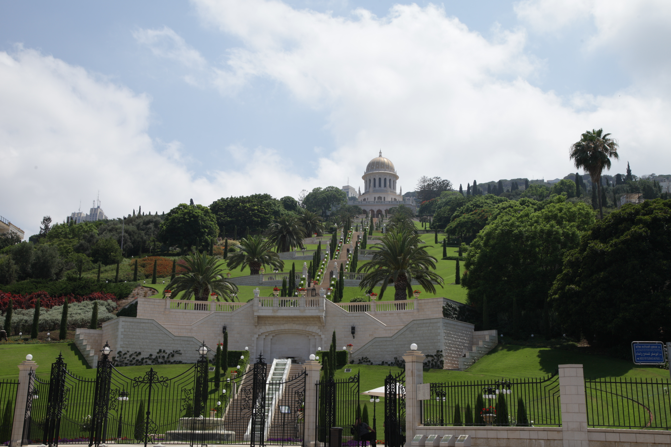 Sanctuaire bahaï et ses jardins. Haïfa. Haifa